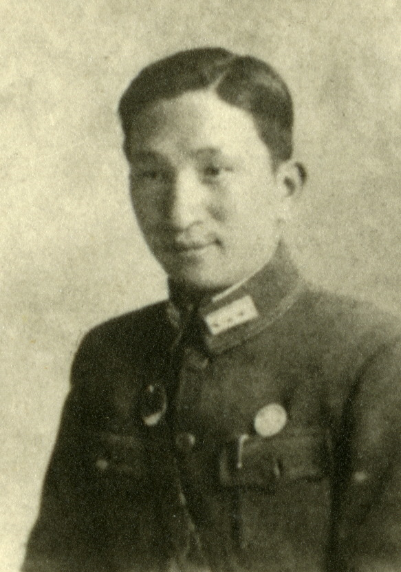 나월환(羅月煥, 1912. 10. 14 ~ 1942. 3. 31)